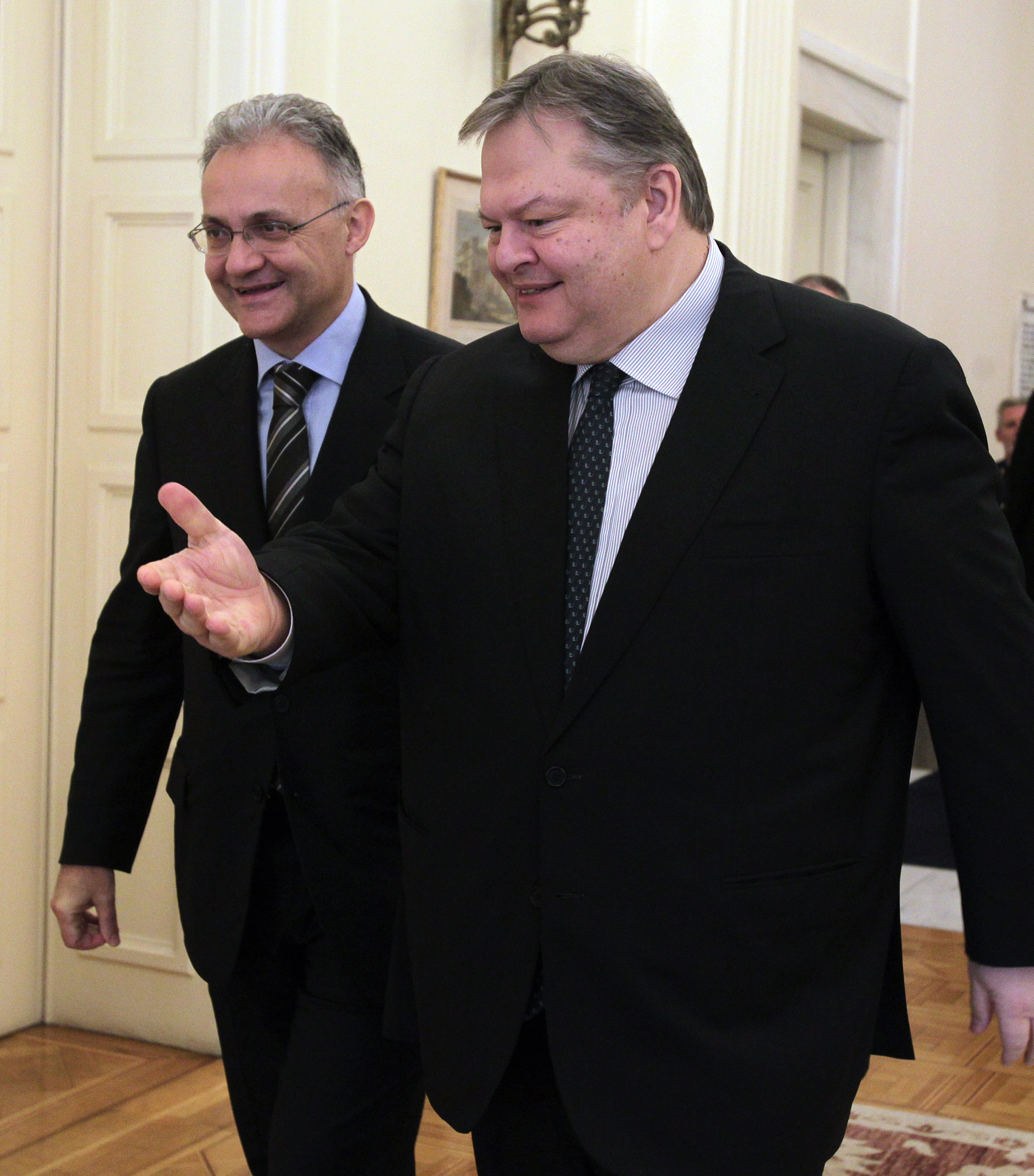 Ο Αντιπρόεδρος της Κυβέρνησης και Υπουργός Εξωτερικών, Ευάγγελος Βενιζέλος, συναντήθηκε την Παρασκευή 6 Δεκεμβρίου, στο Υπουργείο Εξωτερικών, με τον Υπουργό Άμυνας της Ιταλίας κ. Mario Mauro.